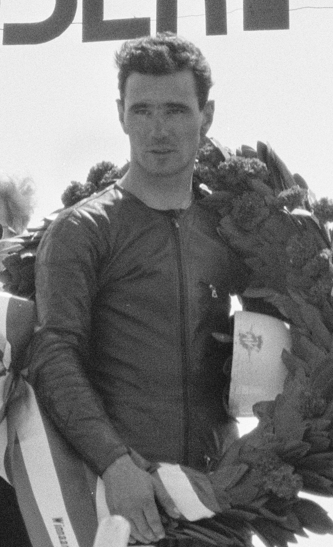 Collectie / Archief : Fotocollectie Anefo Reportage / Serie : TT Assen 1960 Beschrijving : Huldiging Carlo Ubbiali (winnaar 125cc en 250cc) Datum : 26 juni 1960 Locatie : Assen Trefwoorden : motorsport Persoonsnaam : Ubbiali, Carlo Instellingsnaam : TT Fotograaf : Bilsen, Joop van / Anefo Auteursrechthebbende : Nationaal Archief Materiaalsoort : Negatief (zwart/wit) Nummer archiefinventaris : bekijk toegang 2.24.01.05 Bestanddeelnummer : 911-3660